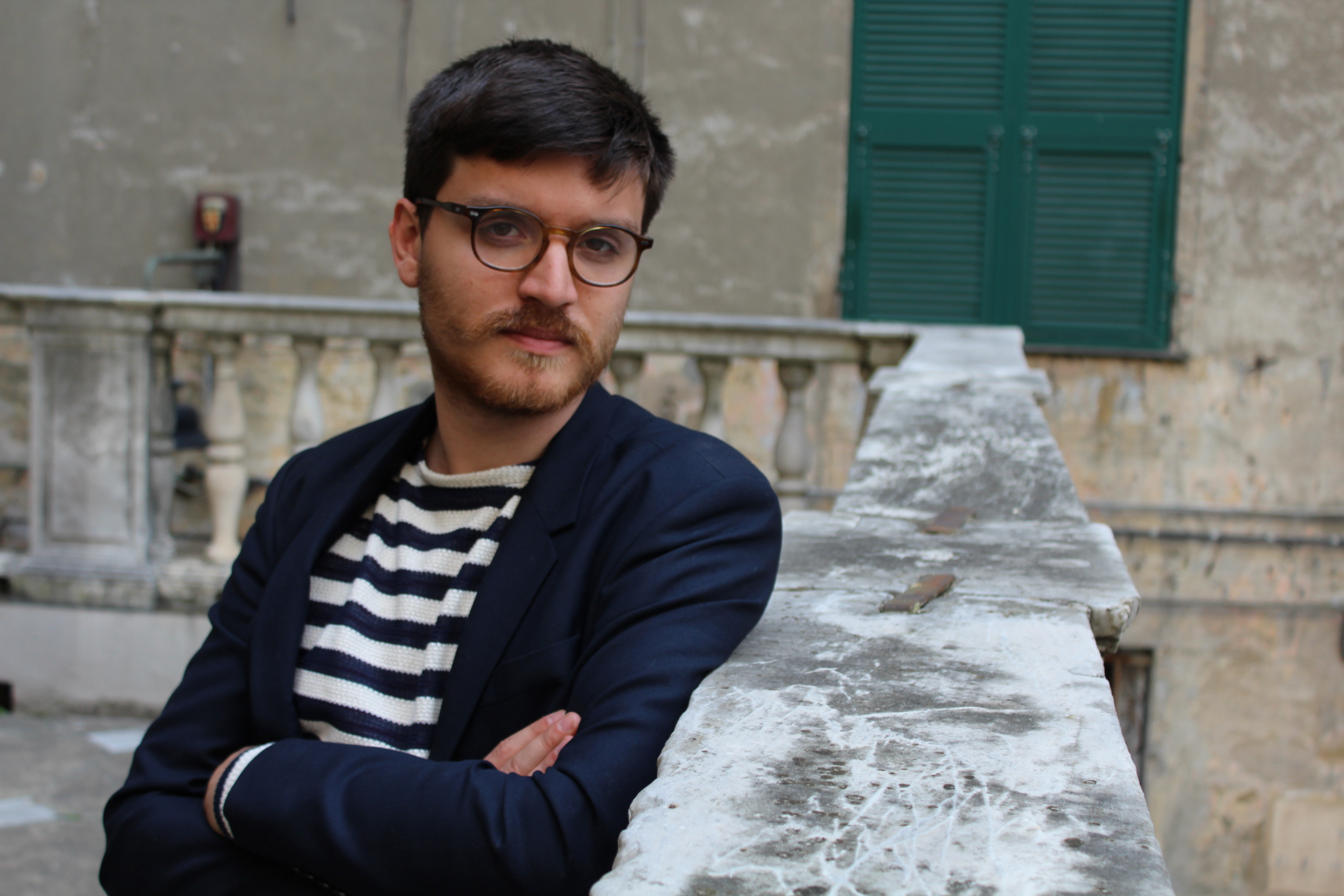 Foto di Leonardo Caffo, Genova.